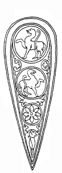 Иллюстрация из "Энциклопедии оружия" Вендалена Бехайма.